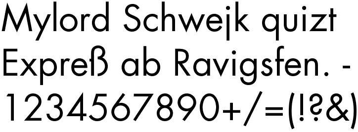 Schriftbeispiel: Bembo Roman